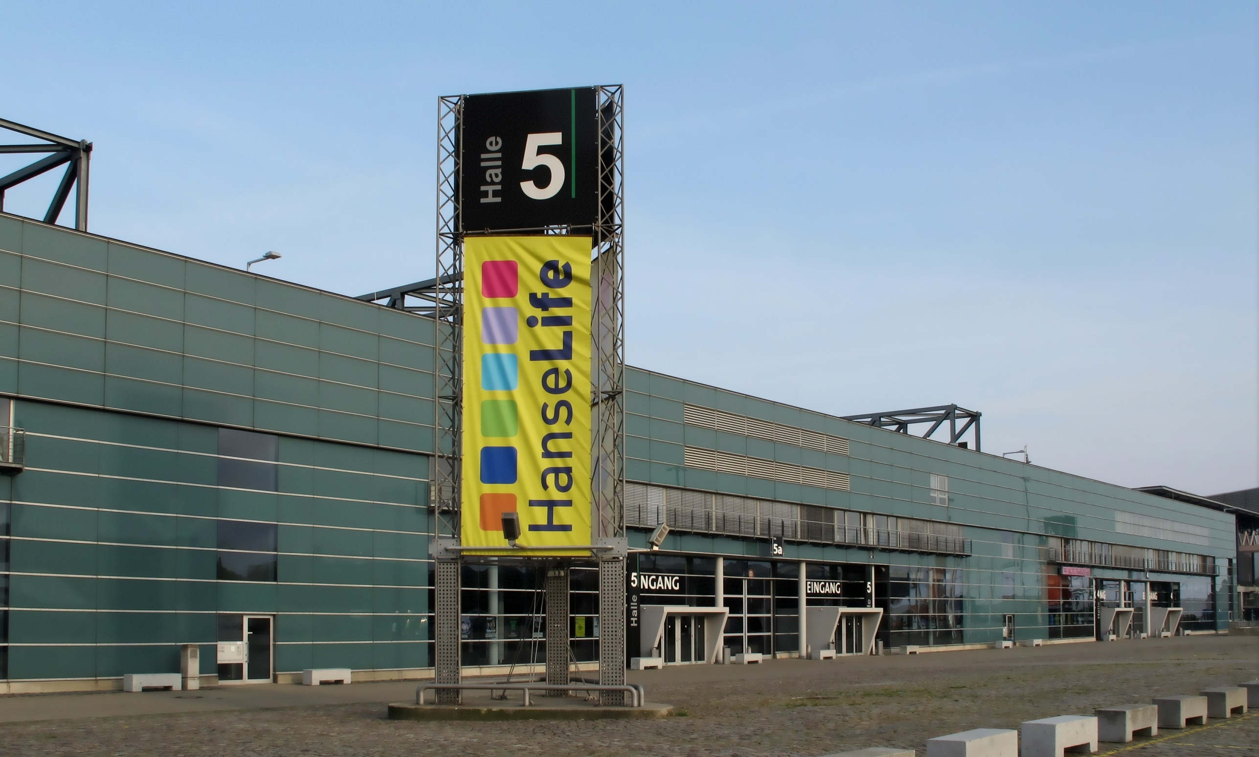 Bremen, Messe- und Veranstaltungszentrum, Messehallen 5 und 4 (rechts), Ansicht Bürgerweide